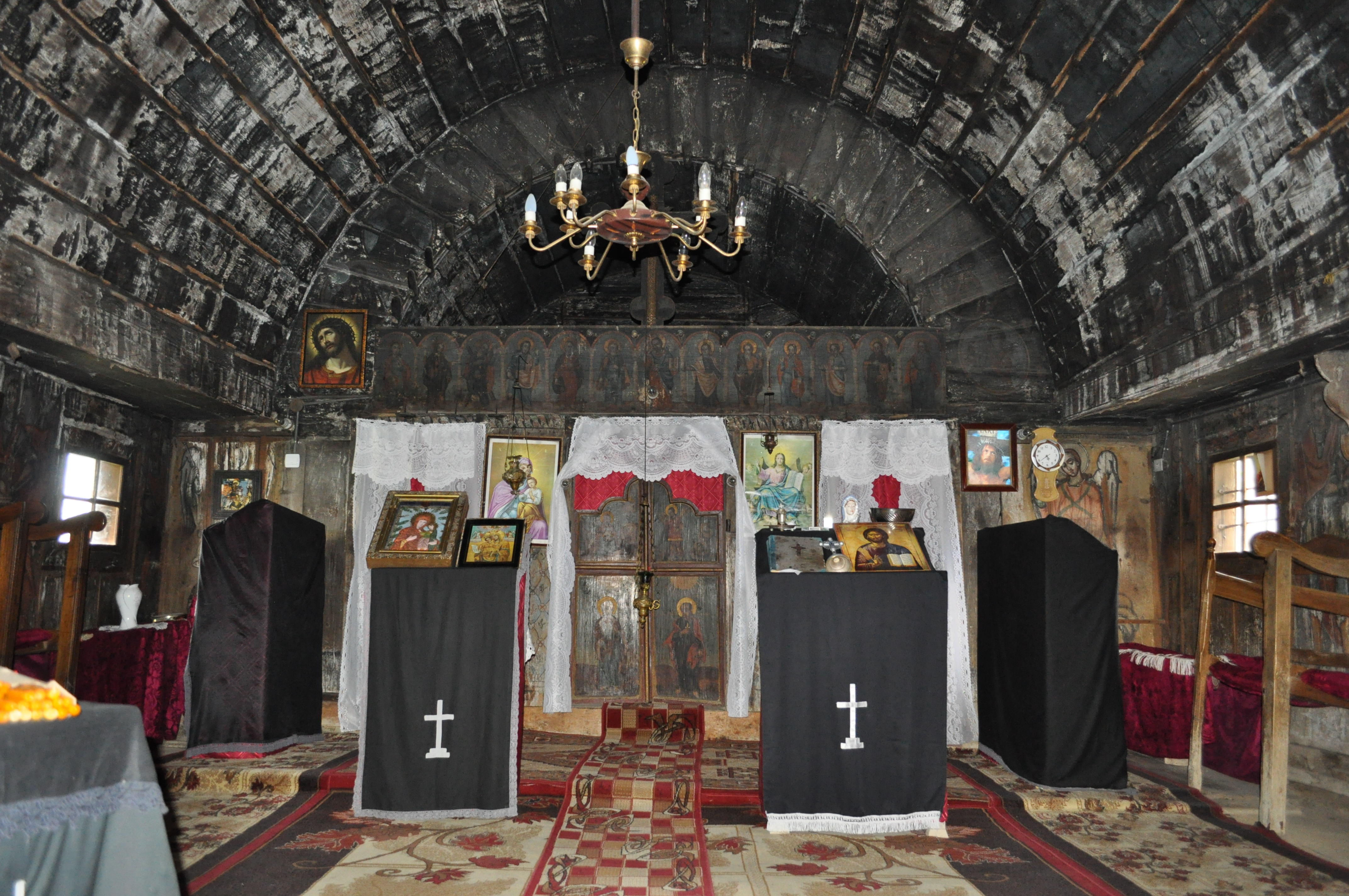 Biserica de lemn "Sfântul Dumitru" , sat DUBEŞTI; comuna OHABA LUNGĂ